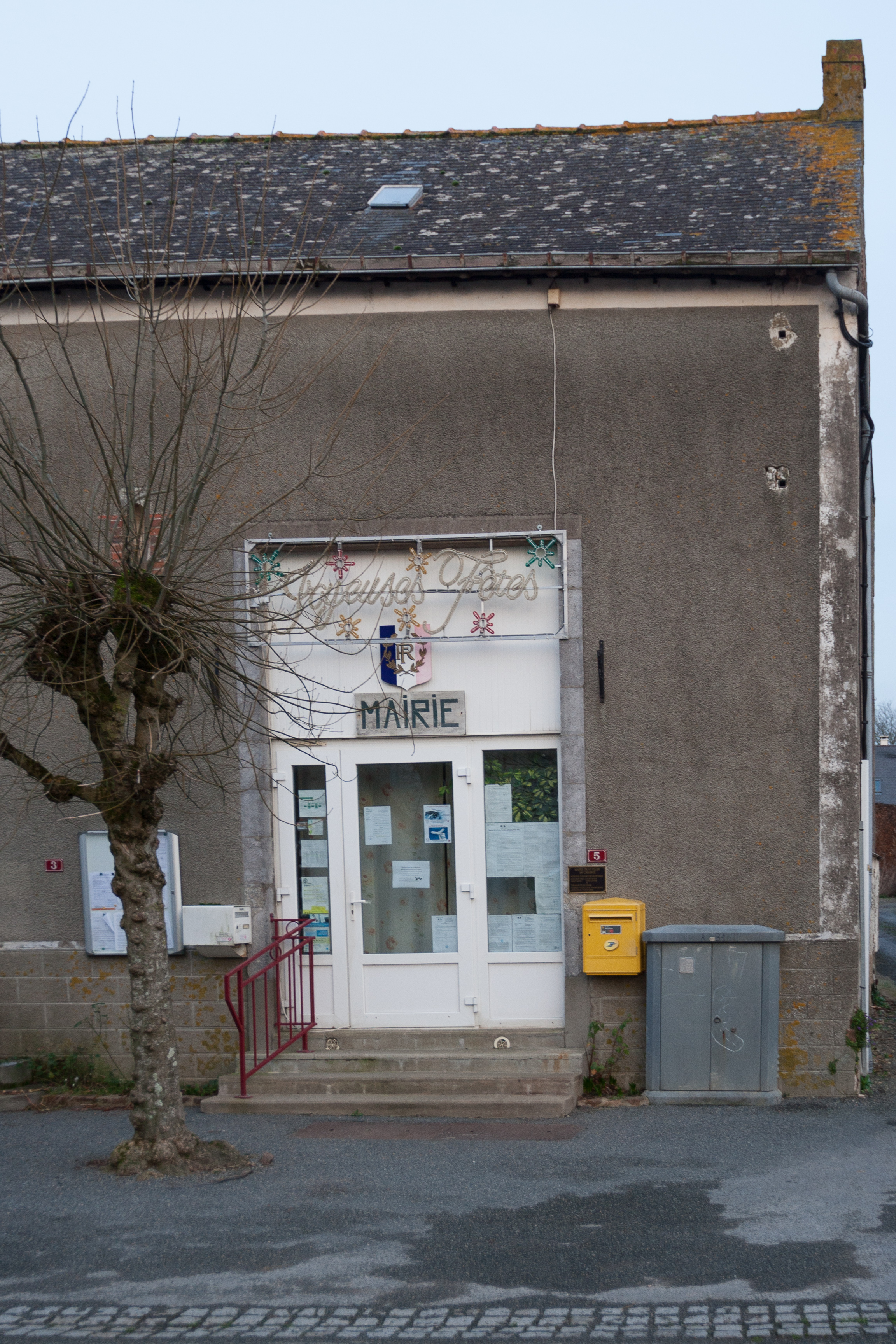 Mairie de Saint-Léger, au moment des fêtes de fin d'année 2015.